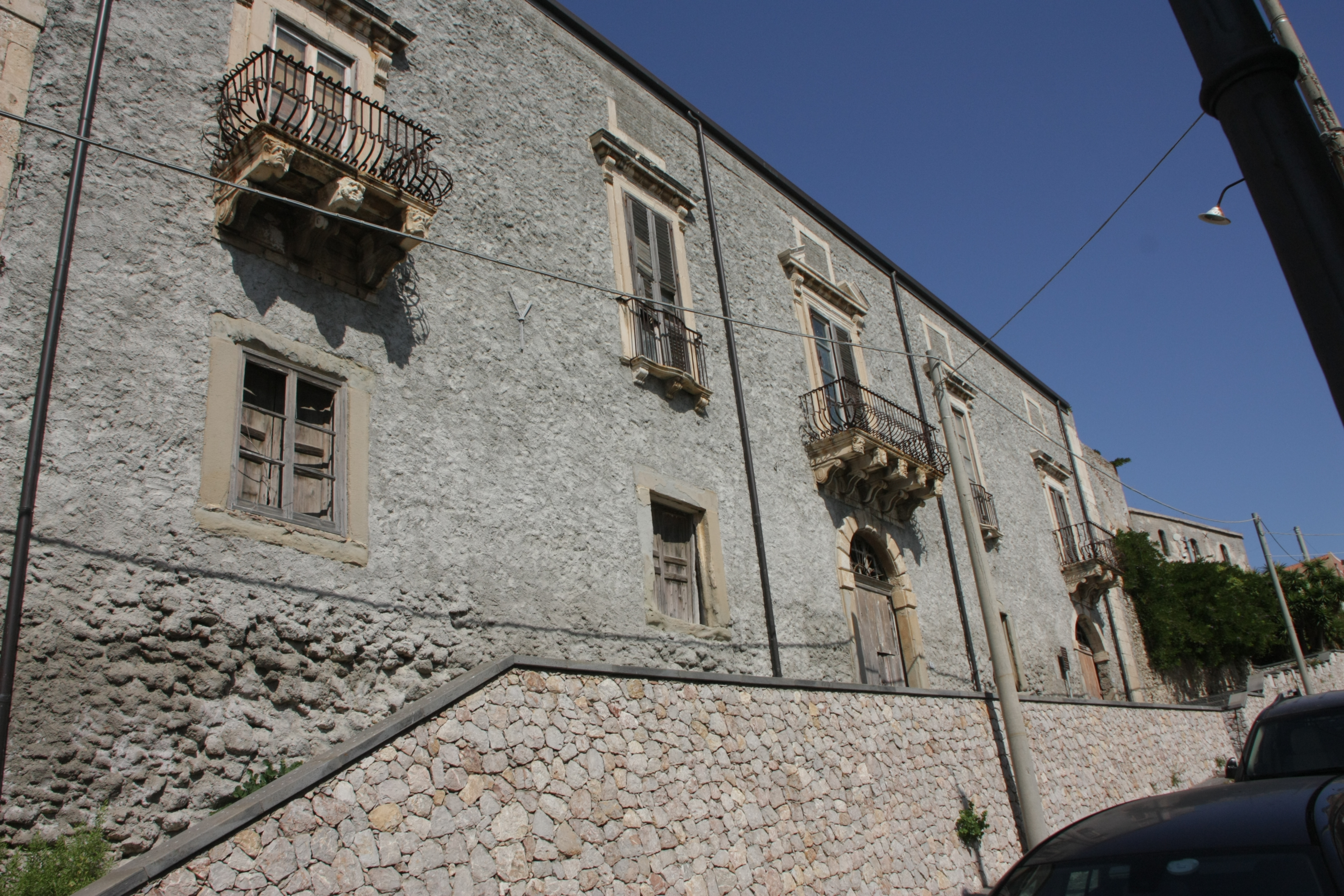 Palazzo dei Giurati